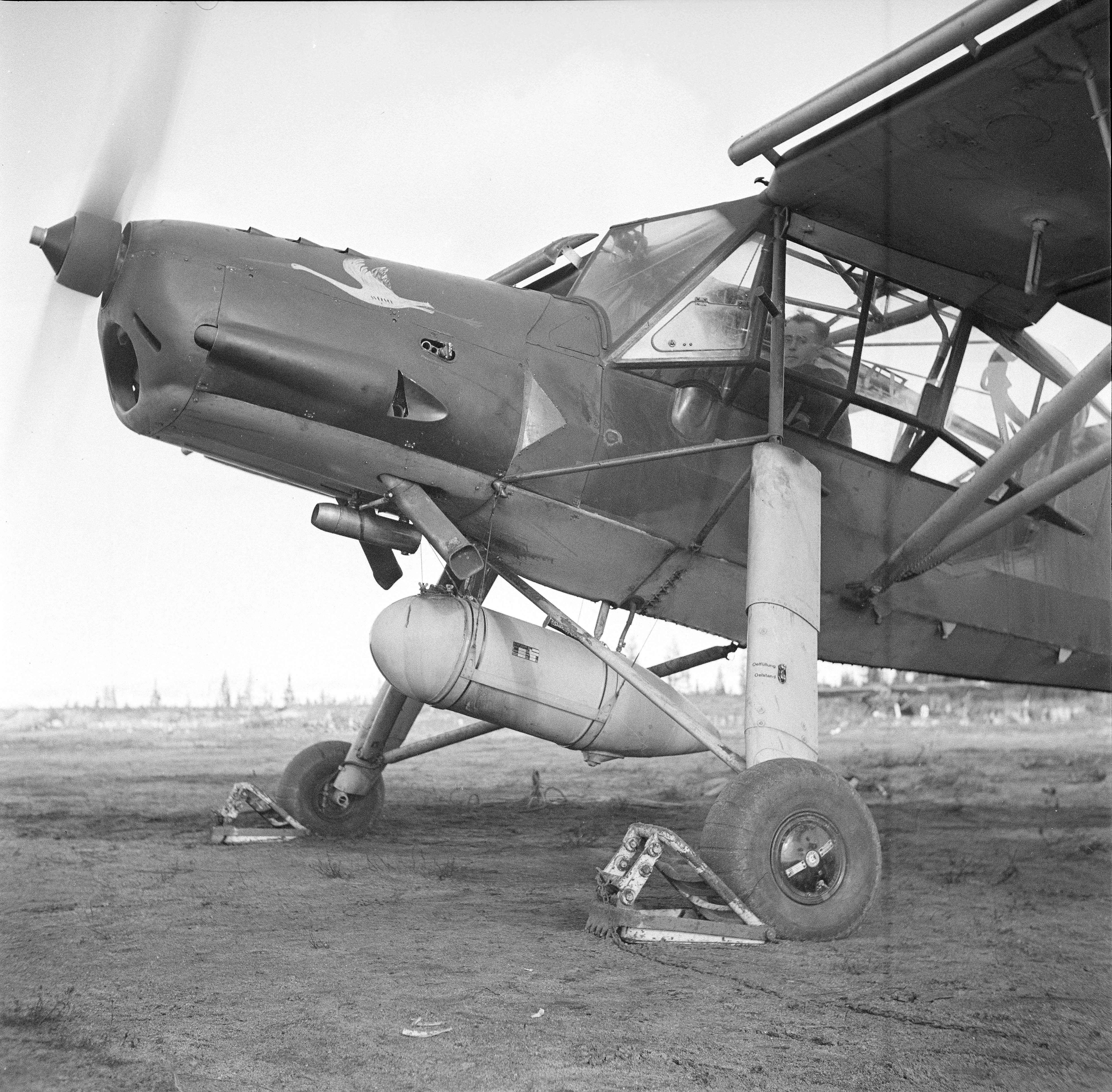 Fieseler Storch pommilastissa valmiina tehtäväänsä. (Kuvassa on lähitiedustelulentue 1(H)/32:n Fieseler Fi 156 Storch -lentokone. Alkuperäisestä kuvatekstistä poiketen koneessa on 80 litran lisäpolttoainesäiliö, ei pommi.). Kuvauspaikka: Kemijärvi